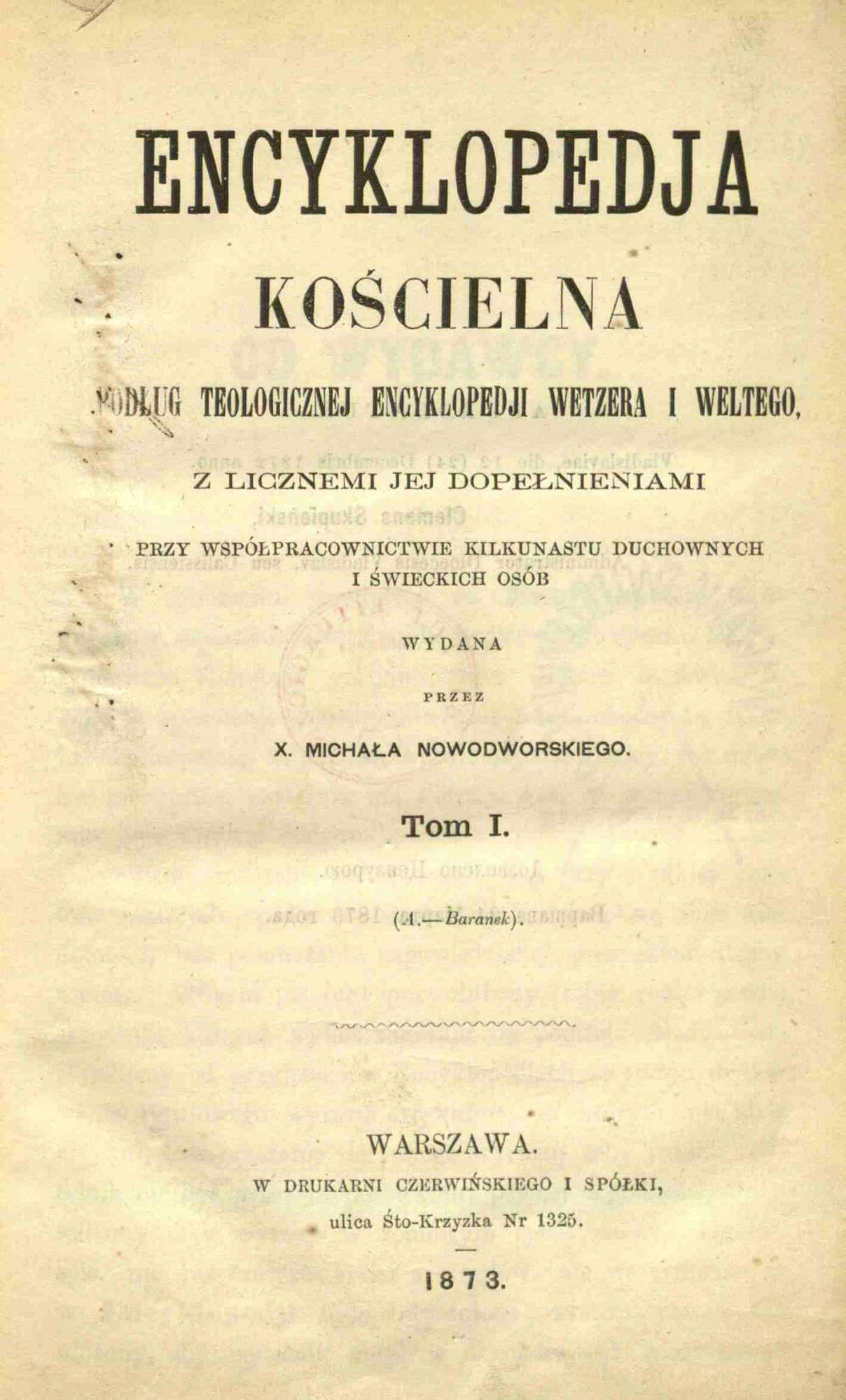 Encyklopedia składająca się z 33 tomów wydanych w latach 1873-1933.